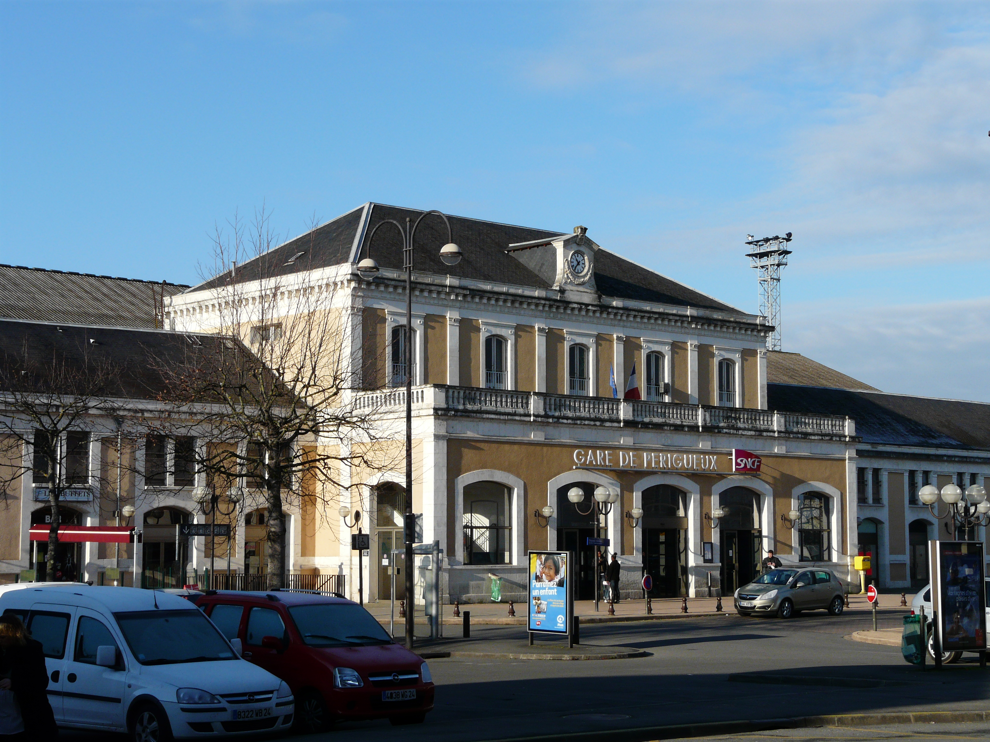 Gare de Périgueux, Dordogne, France